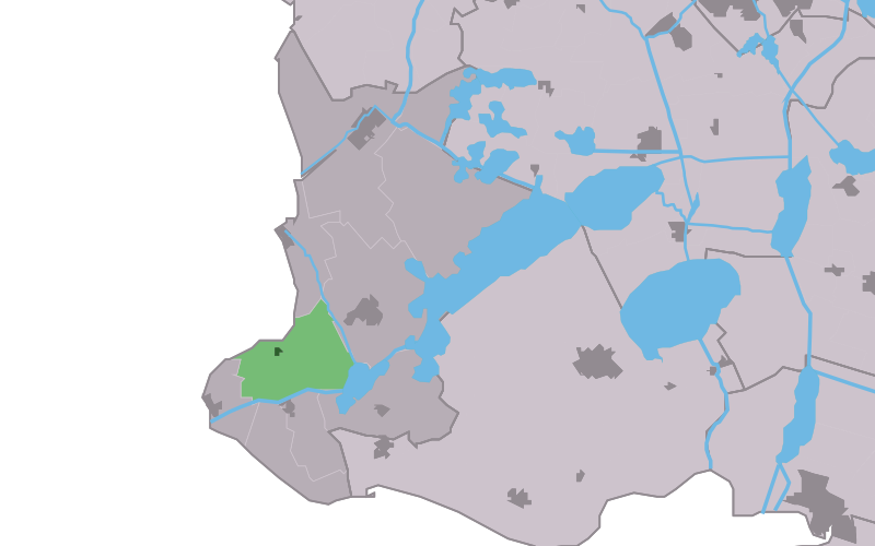 Kaartsje fan himrik fan Molkwar